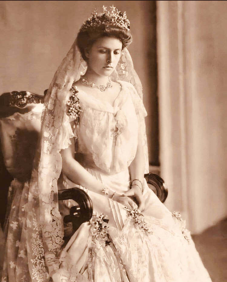 Origen: [1]